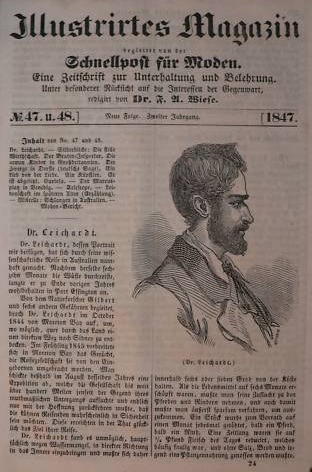 Bildnis von Ludwig Leichhardt auf der Titelseite des Illustrirten Magazins. Nr. 47 und 48, 16 × 23 cm